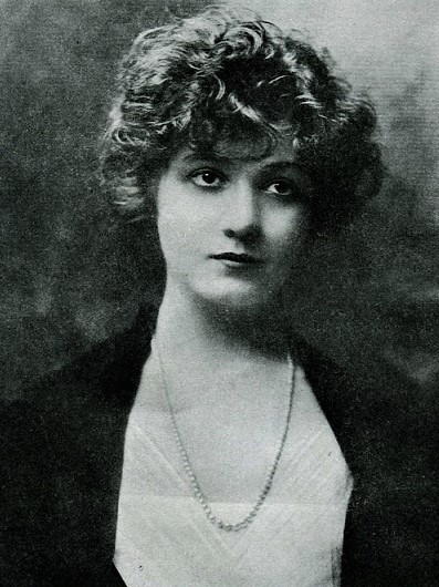 Edna Mayo